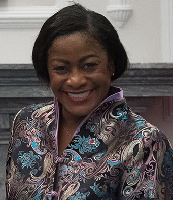 聖露西亞參議院議長丹尼爾（Andy Daniel）及眾議院議長施朵瓊（Leonne Theodore-John）應邀於8日至12日訪台